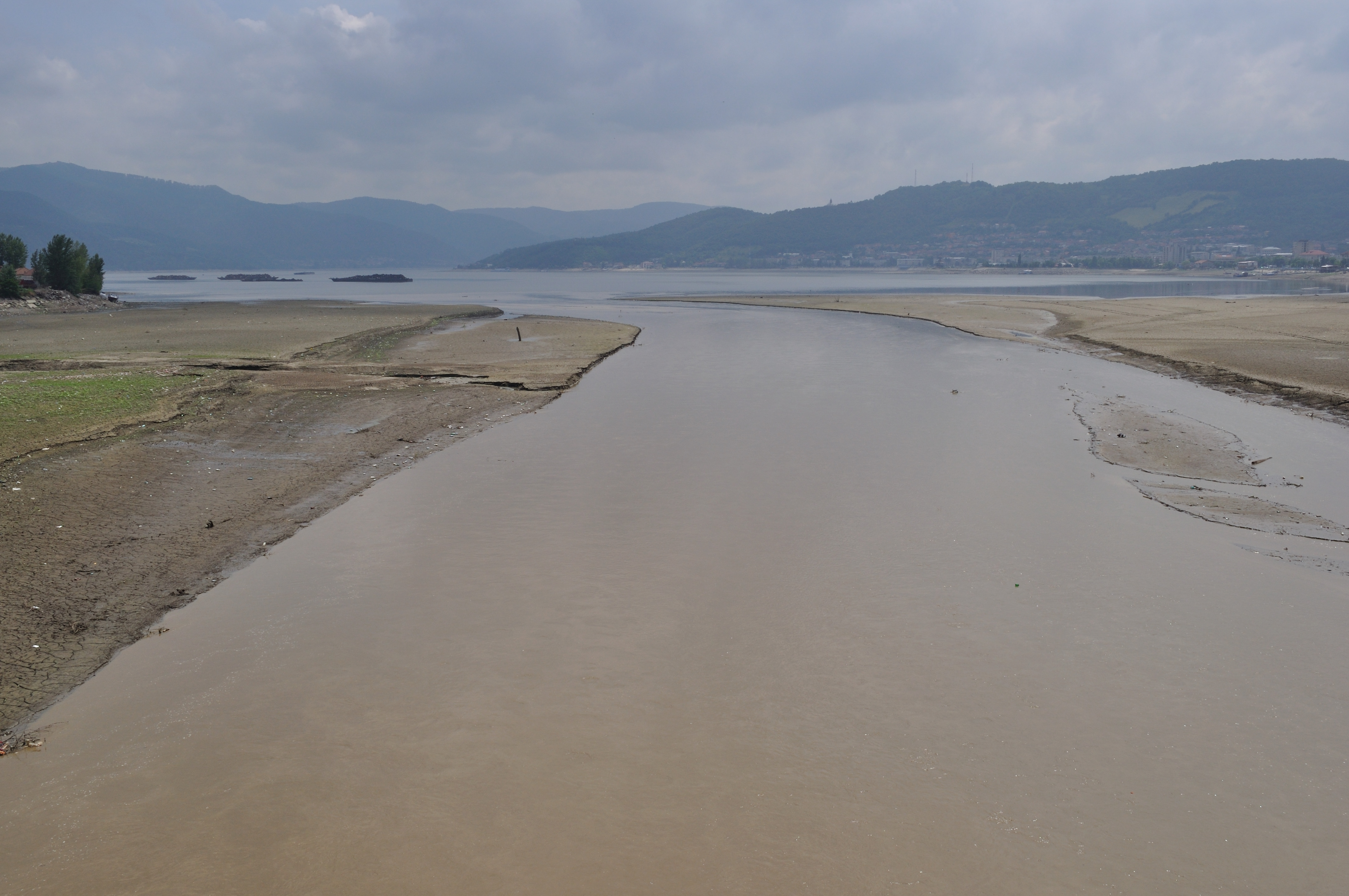 Râul Cerna la vărsarea în Dunăre